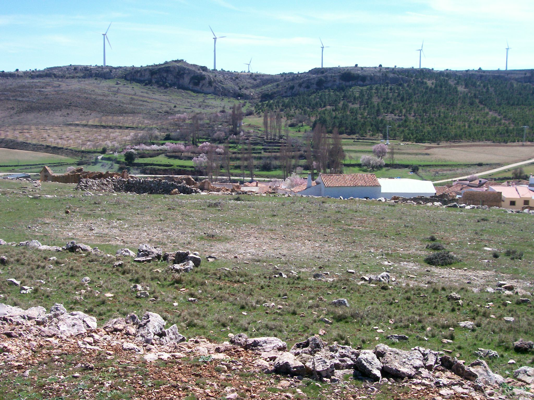 Imagen de la pedanía del Berro, en primer plano se aprecian las famosas terrazas de piedra, y al fondo, el parque eólico de la Isabela. Fotografía realizada por mí mismo. Dominio público